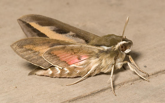 Hyles gallii